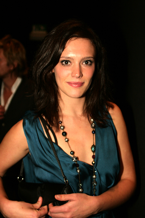 Marieke Dilles (°1986) is een Vlaamse theater- en filmactrice. -- Marieke Dilles op de première van Dossier K in de Metropolis te Antwerpen